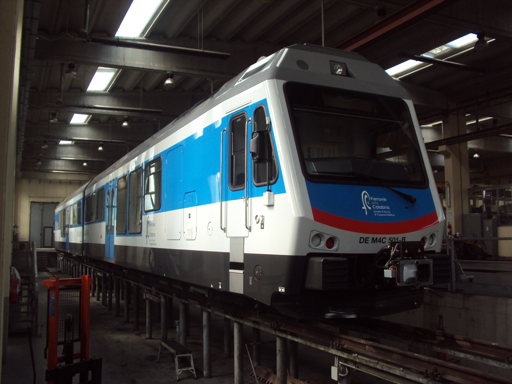 Automotrice a 2 casse DE M4c.501 presso le officine sociali FC di Cosenza